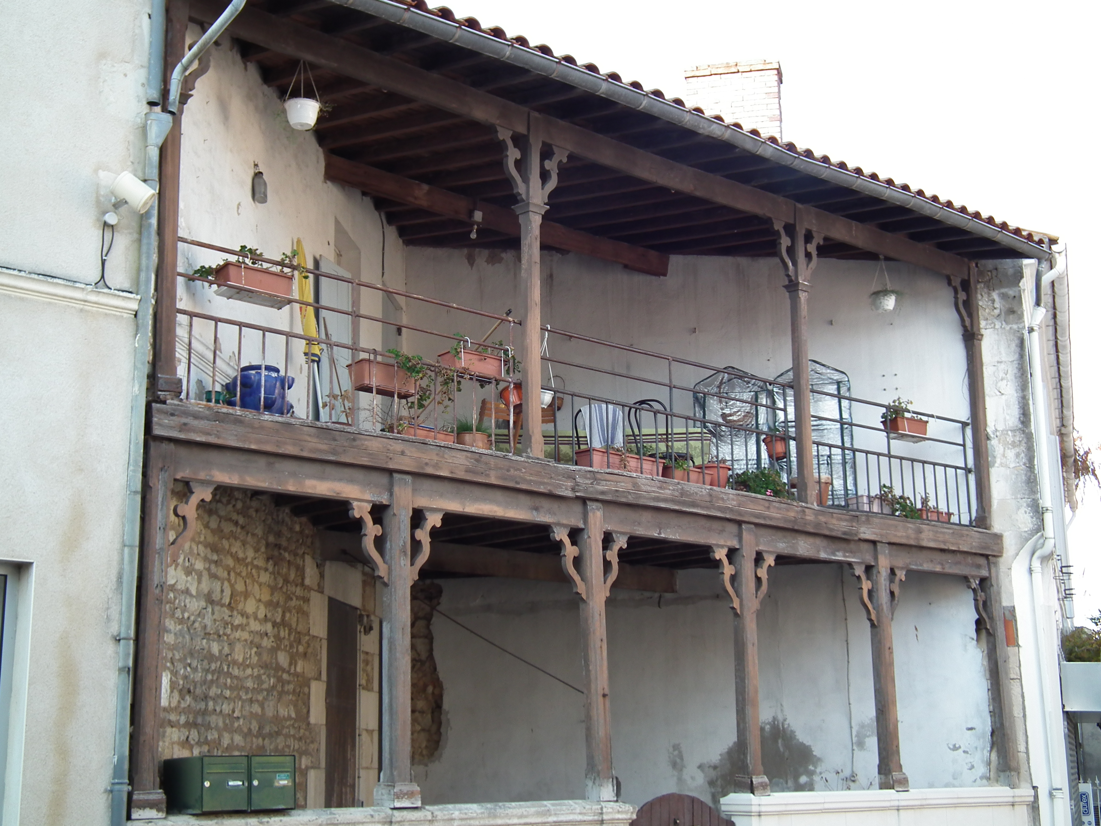 Maison ancienne à Cozes